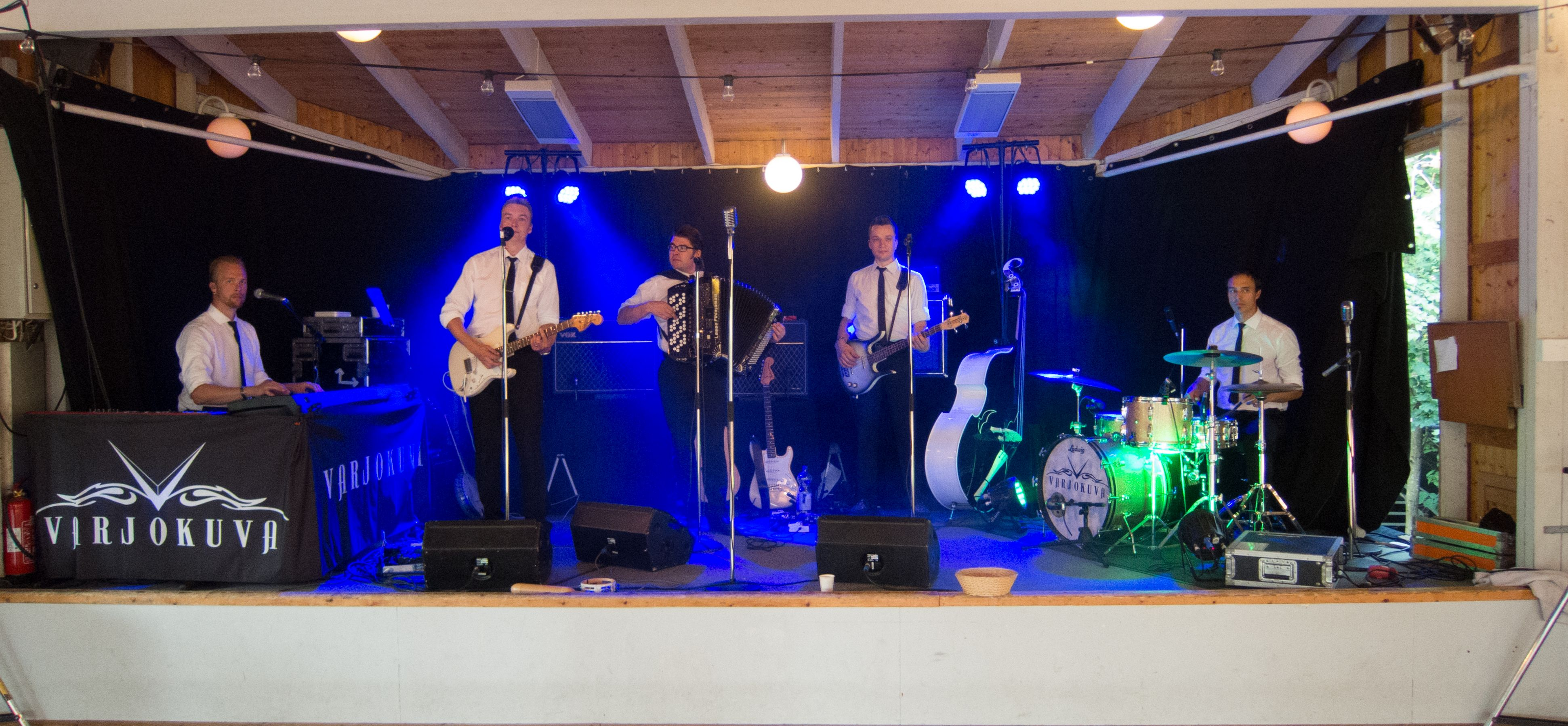 Varjokuva suomalainen tanssiorkesteri